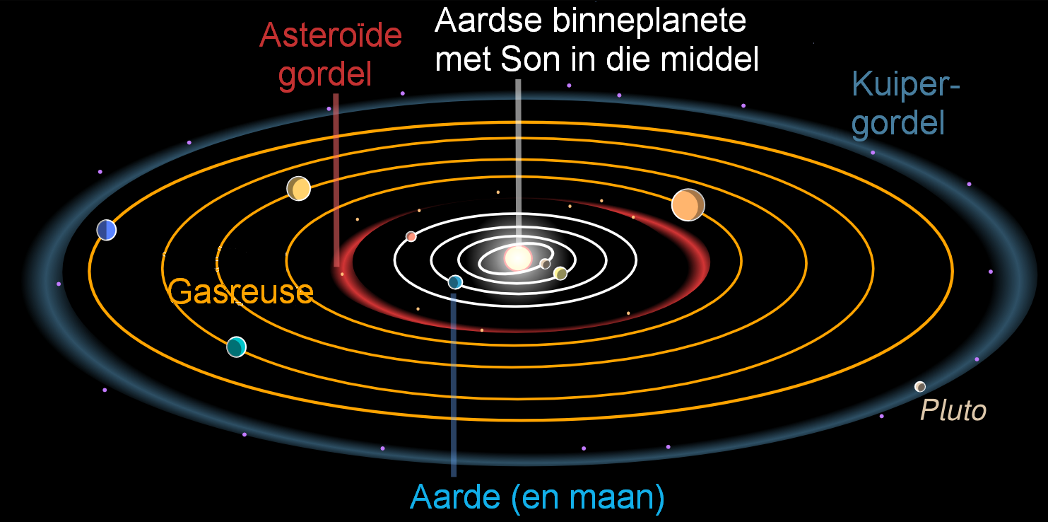 solar system zones